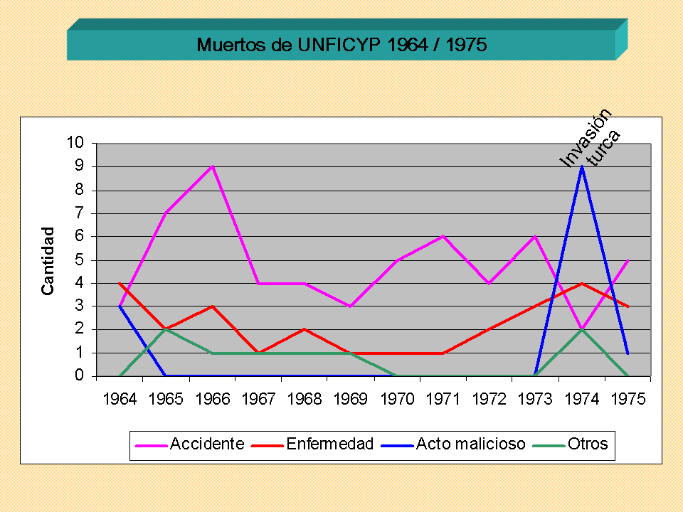 Bajas UNFICYP entre 1964 y 1975